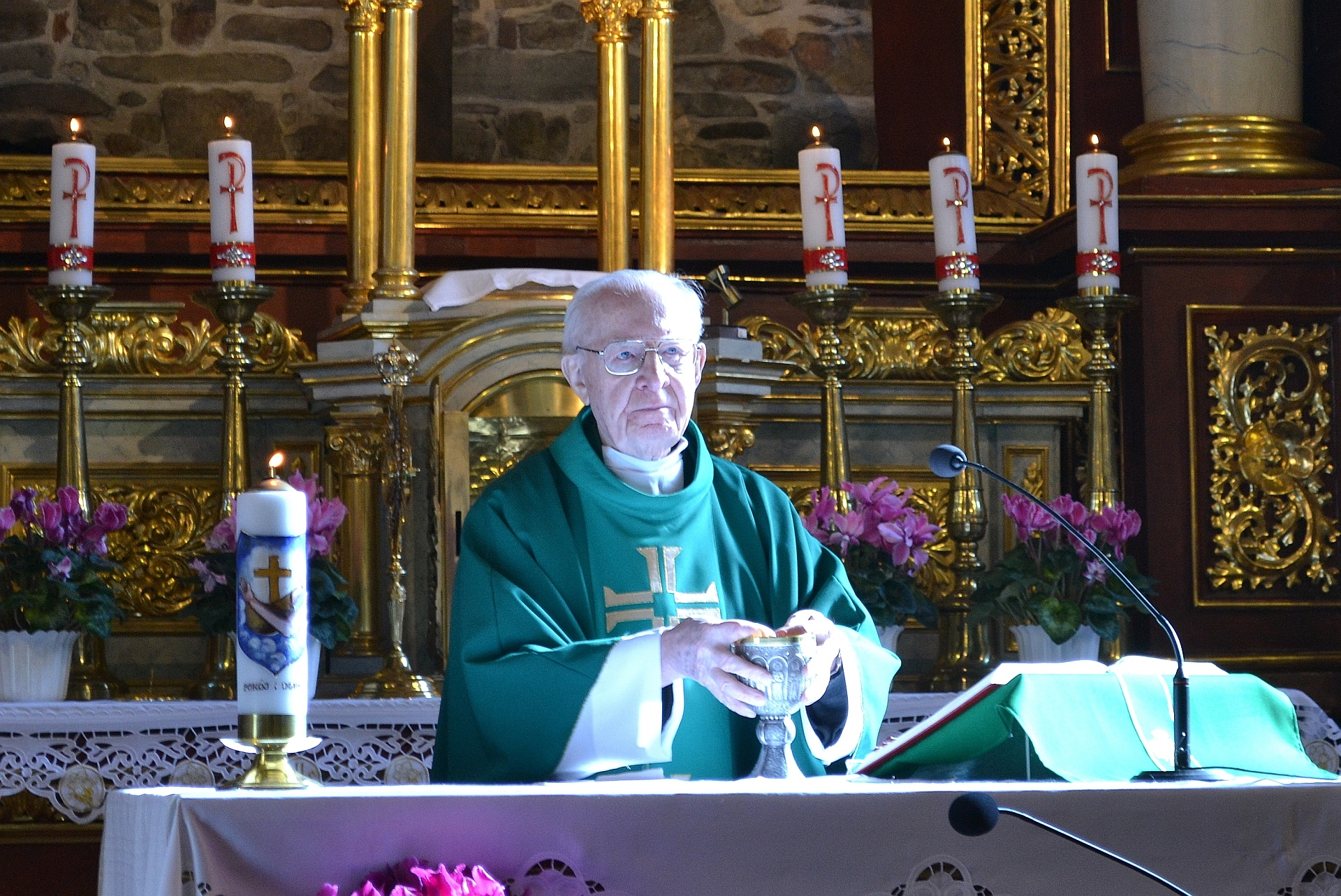 Andrzej Tadeusz Deptuch OFMConv.